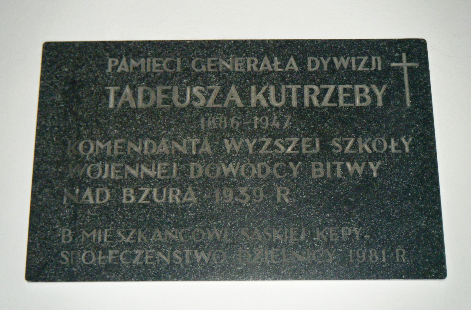 Tablica pamiątkowa w w kościele parafialnym przy ul. Alfreda Nobla w Warszawie.